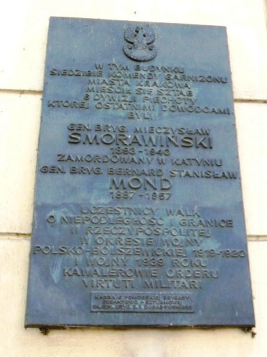 Tablica upamiętniająca dowódców 6 DP